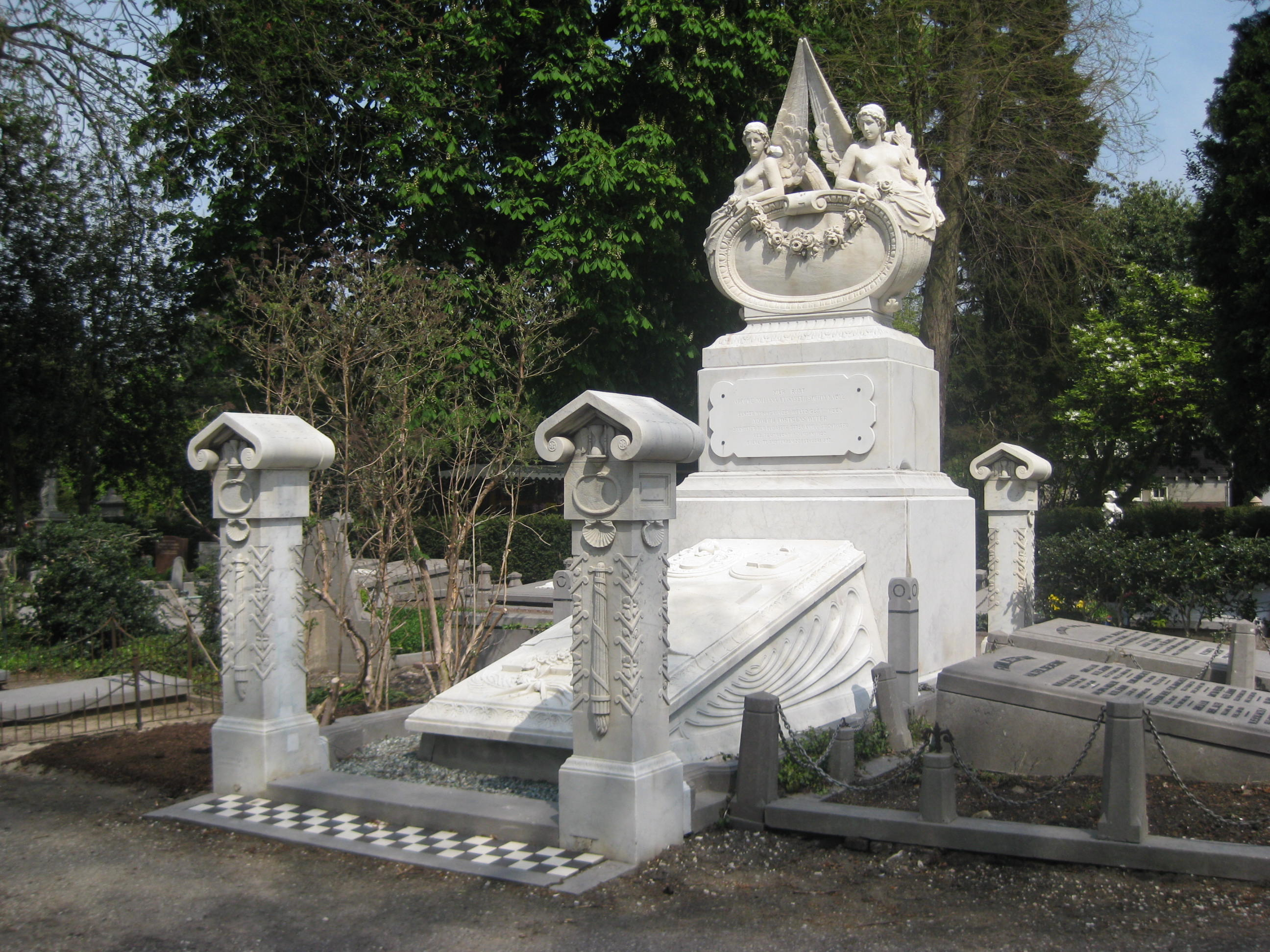 Grafmonument van de familie Johanna Elisabeth Sophia Knoll uit 1900 op Zorgvlied, begraagplaats in Amsterdam